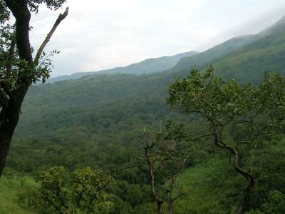 Iruppu upper reaches. Brahmagiris, Coorg, Karnataka Nov 2005